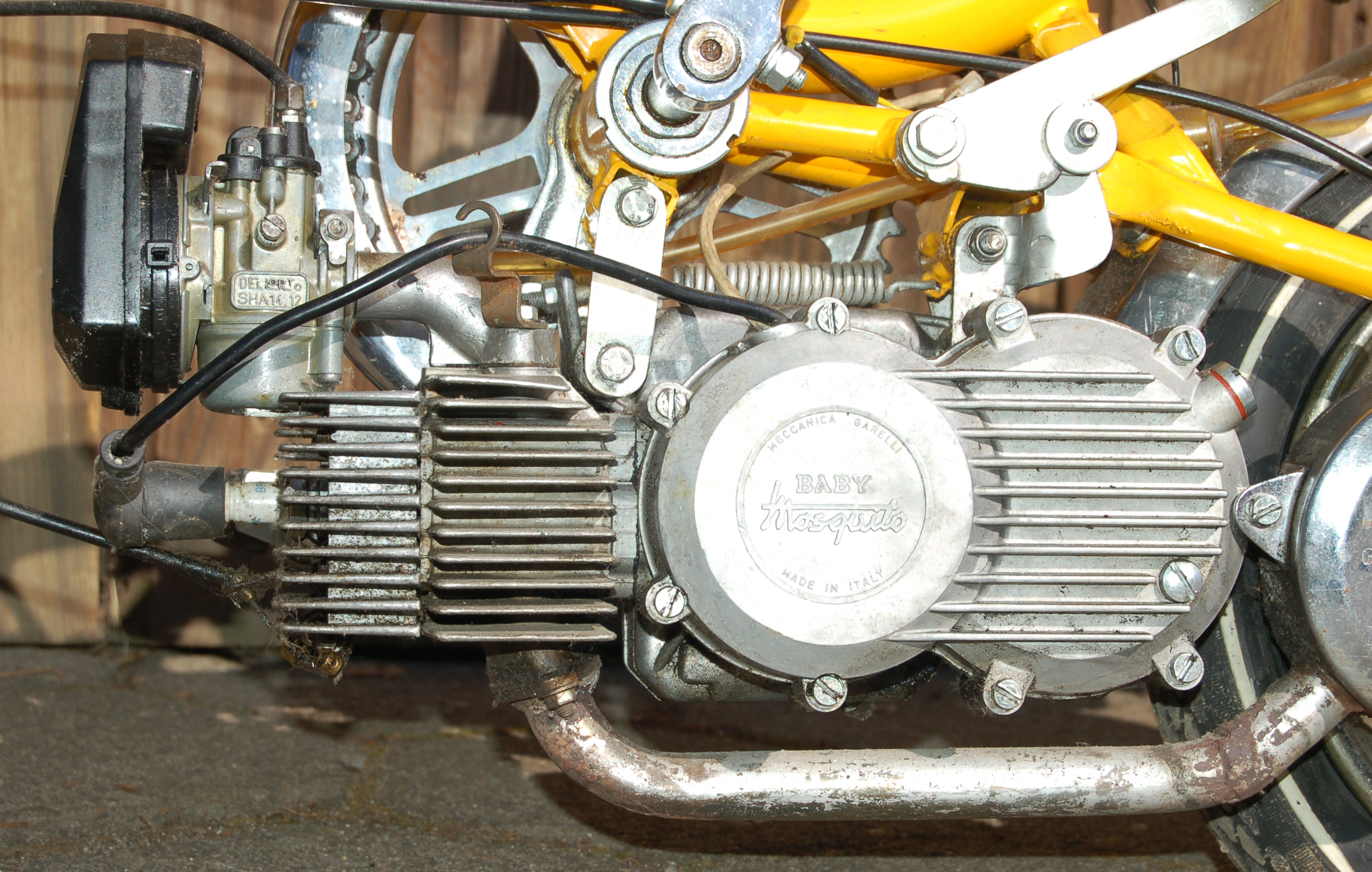 Garelli Mosquito, 34 ccm, 0,9 PS, Baujahr 1972.